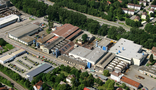 Wasseralfingen